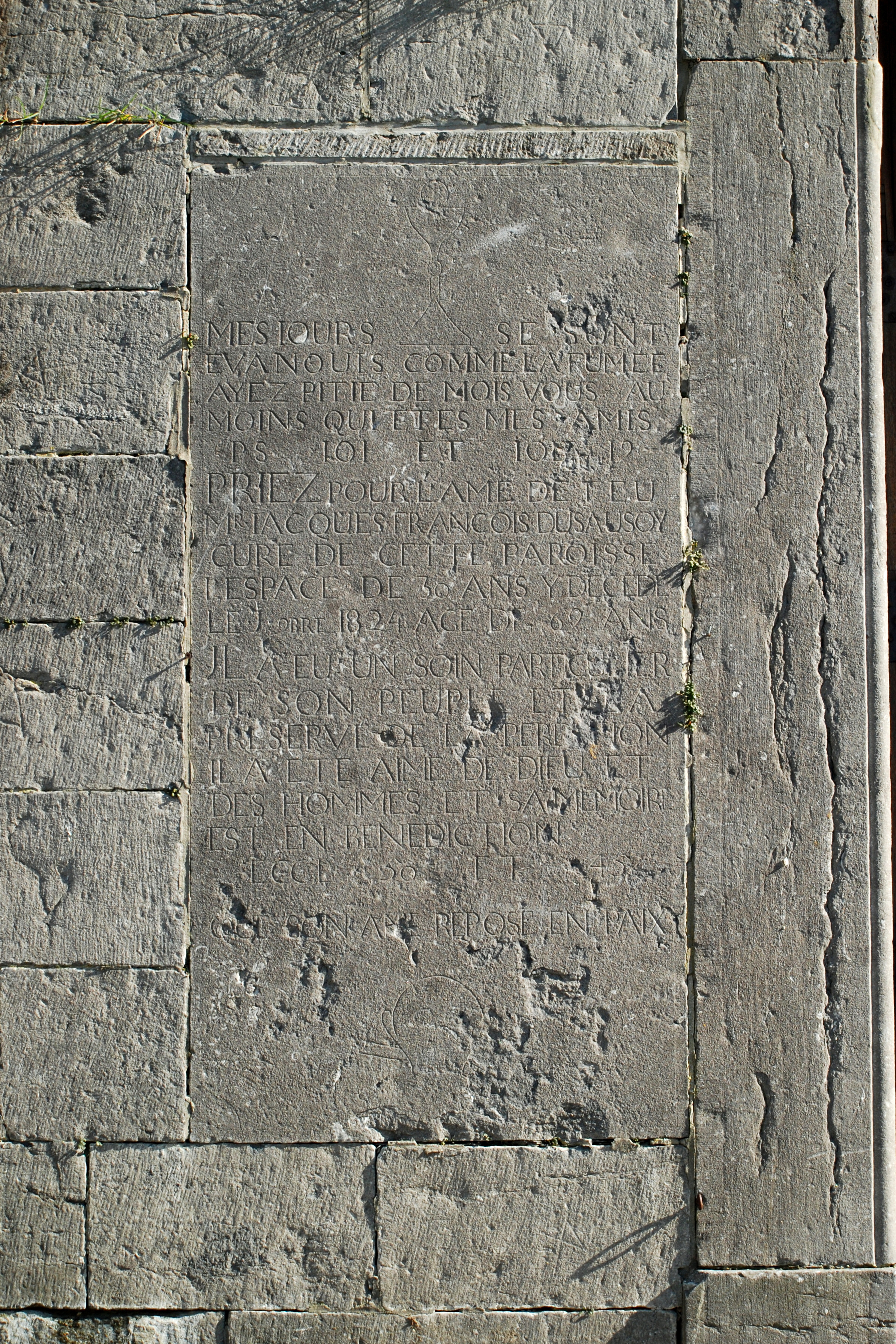 Belgique - Brabant wallon - Église Saint-Étienne de Court-Saint-Étienne